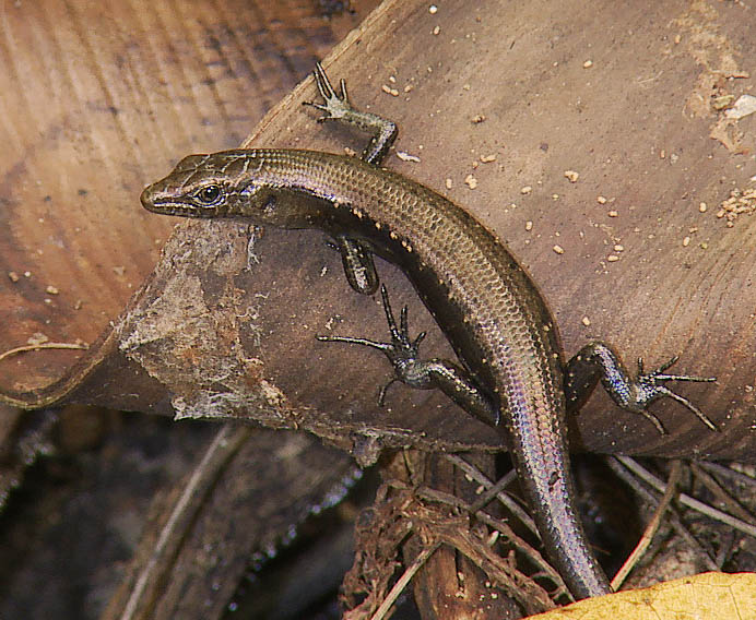 Slevins skink © Bjorn Lardner